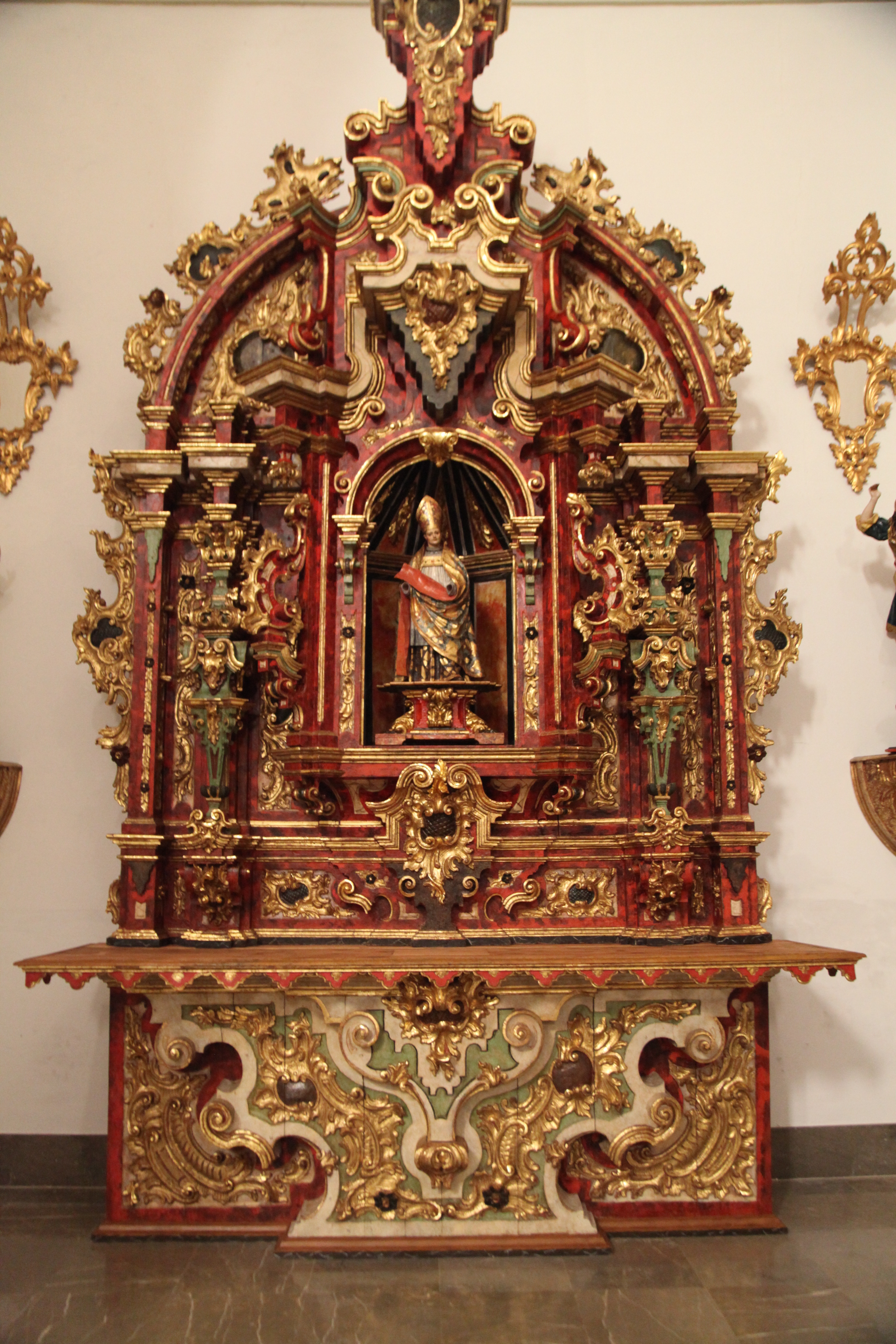 Church of Santa María de la Alhambra